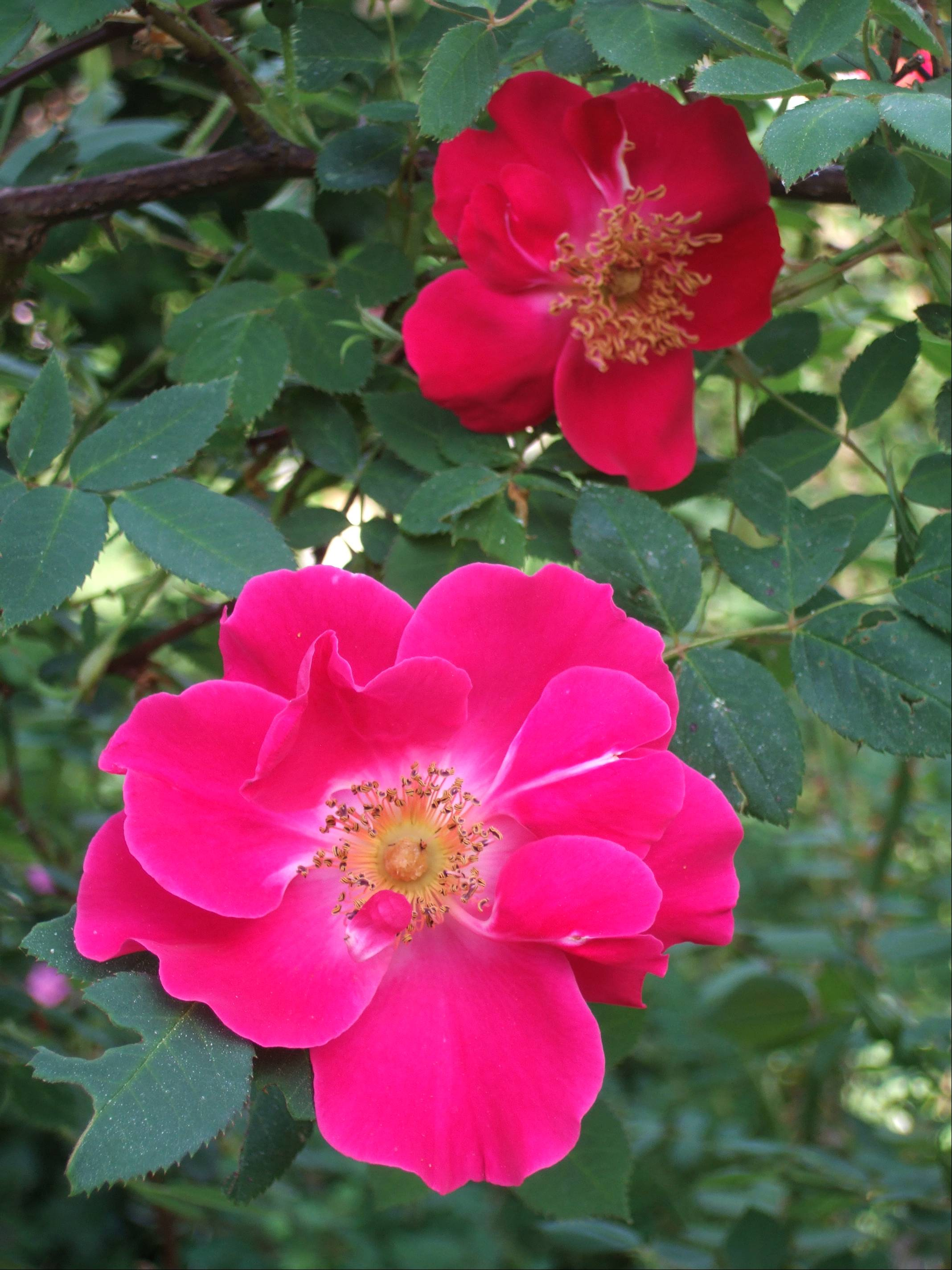 Rosa 'Eddies Jewel'